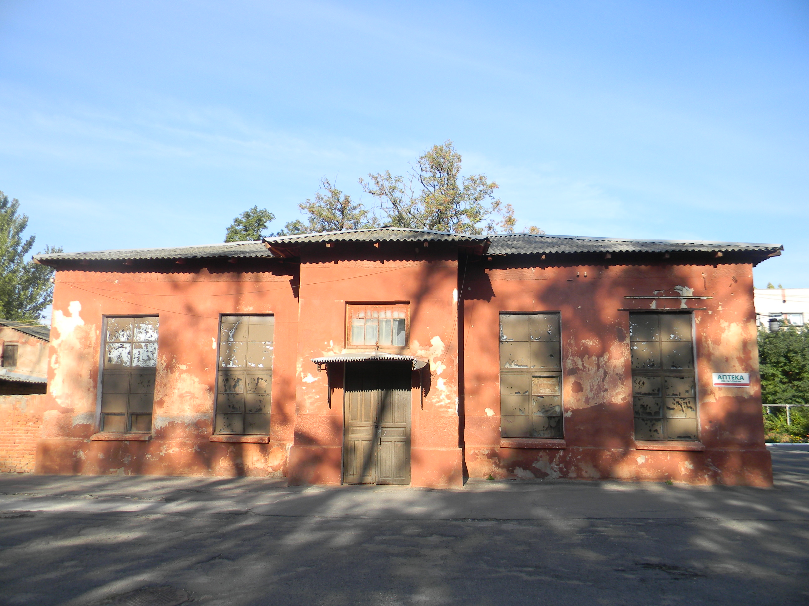 Корпус № 2 (колишня будівля кухні), Херсон, вул. Комарова, 2